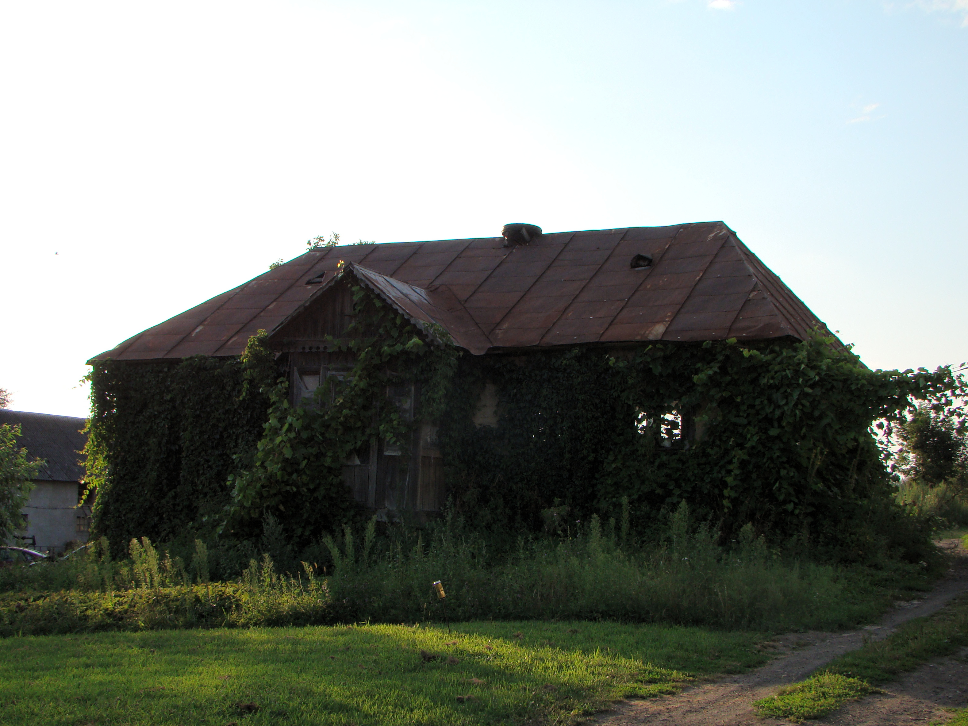 Dům ve vesnici Chochłów, Polsko